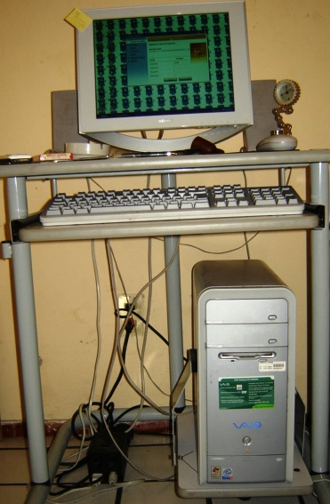 Computadora VIO SONY